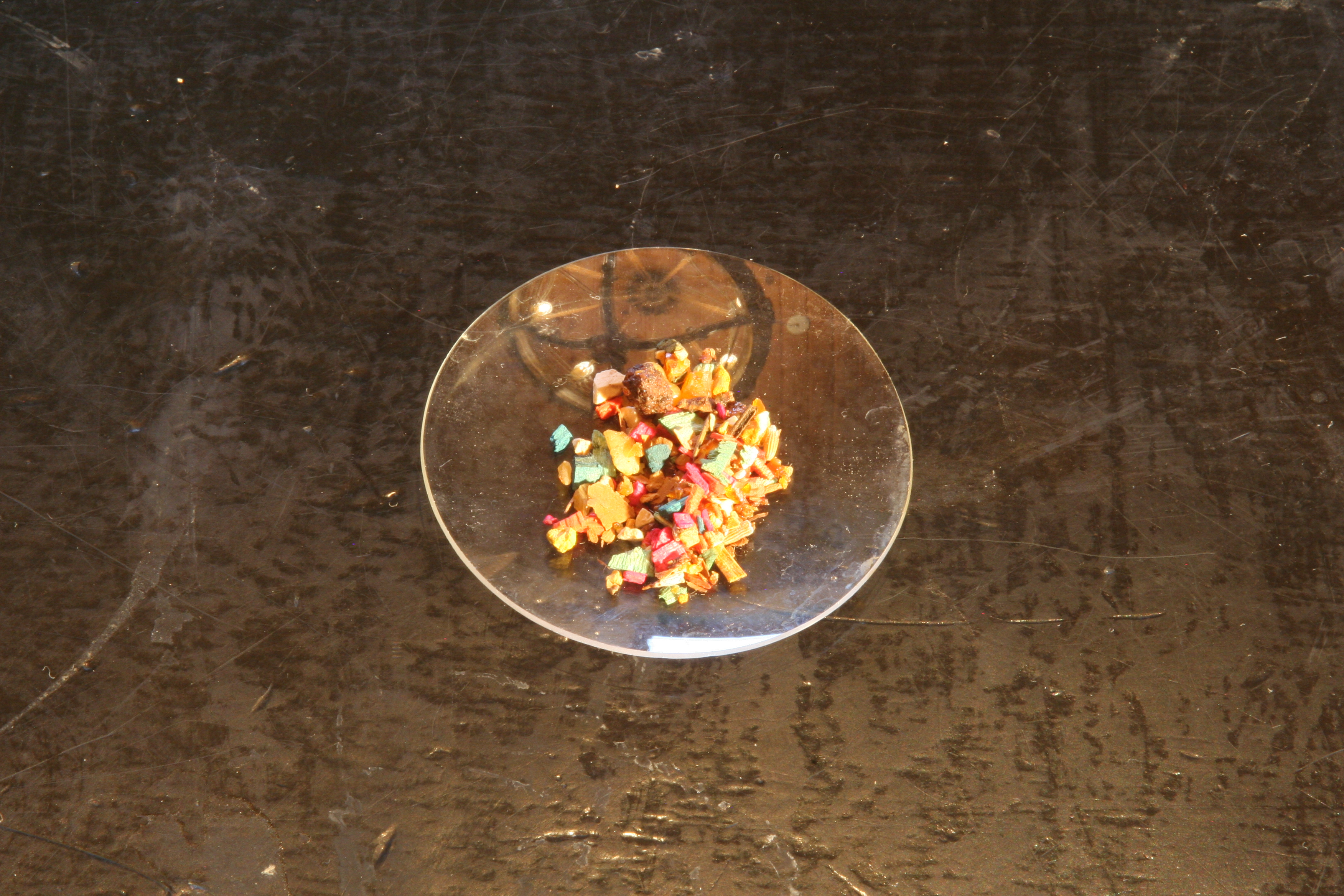 Kongerøgelse.